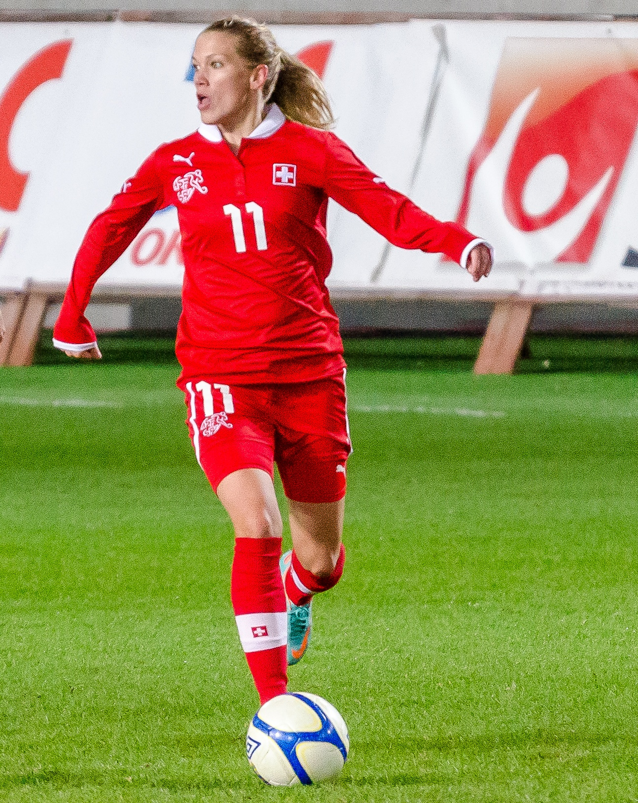 Schweiz anfallare Lara Dickenmann i den första landskampen på Myresjöhus Arena (tillika Pia Sundhages debut som svensk förbundskapten) 23 oktober 2012, där Sverige slog Schweiz med 3-0 inför 4905 åskådare.